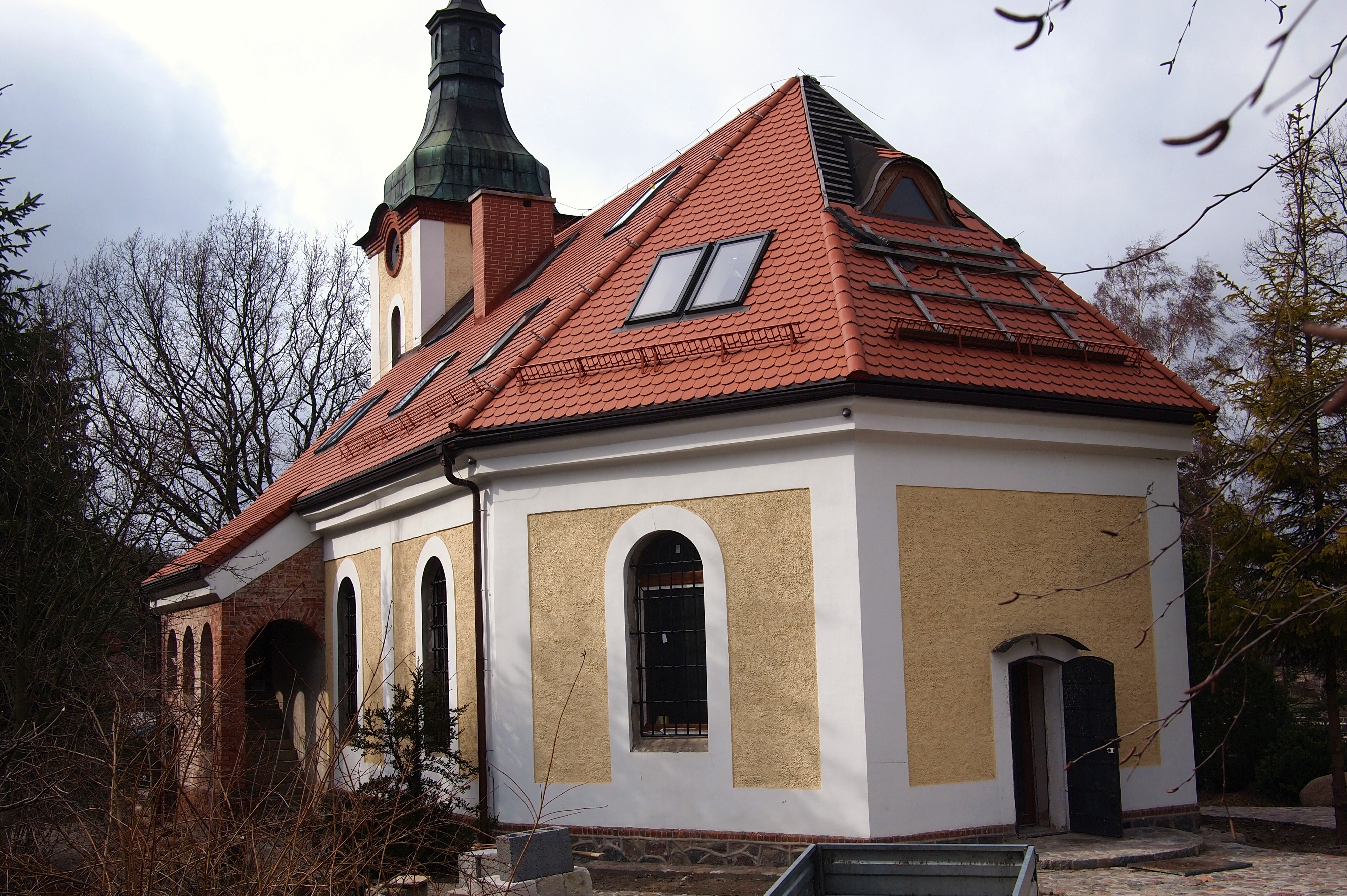 Sulmin - kościół poewangelicki (obecnie galeria)